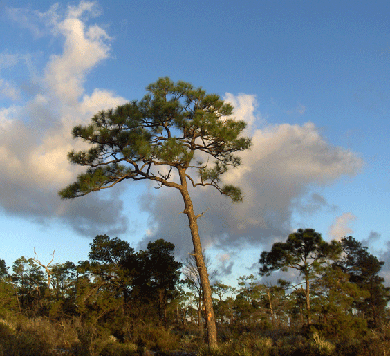 Slash-Pine